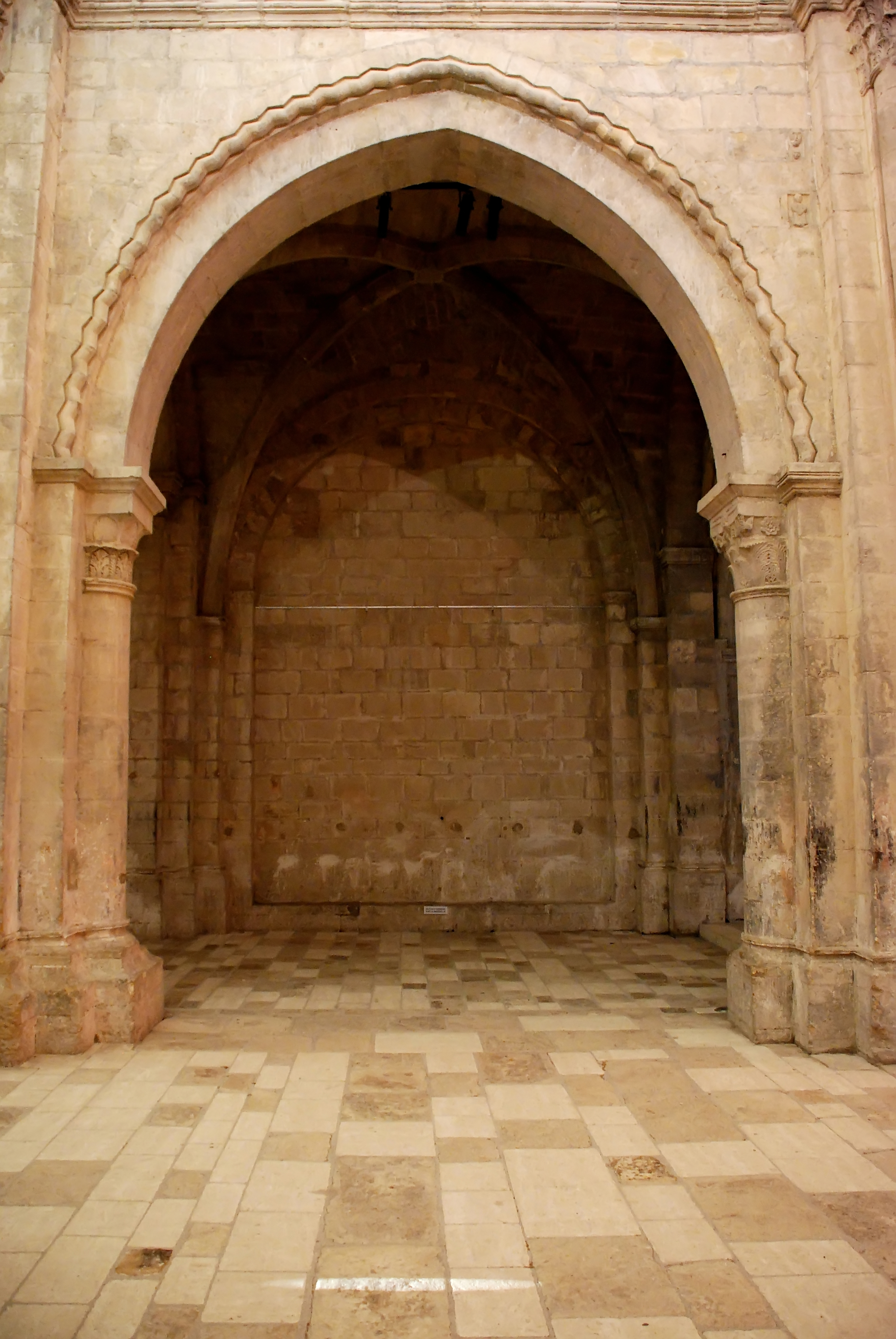 France - Provence - Prieuré Notre-Dame de Salagon